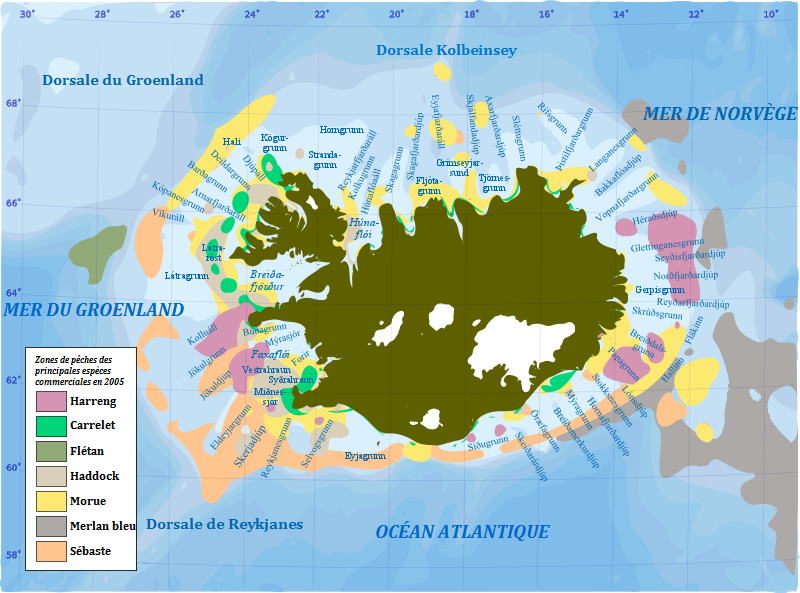 pêche en islande, localisation des principales espèces